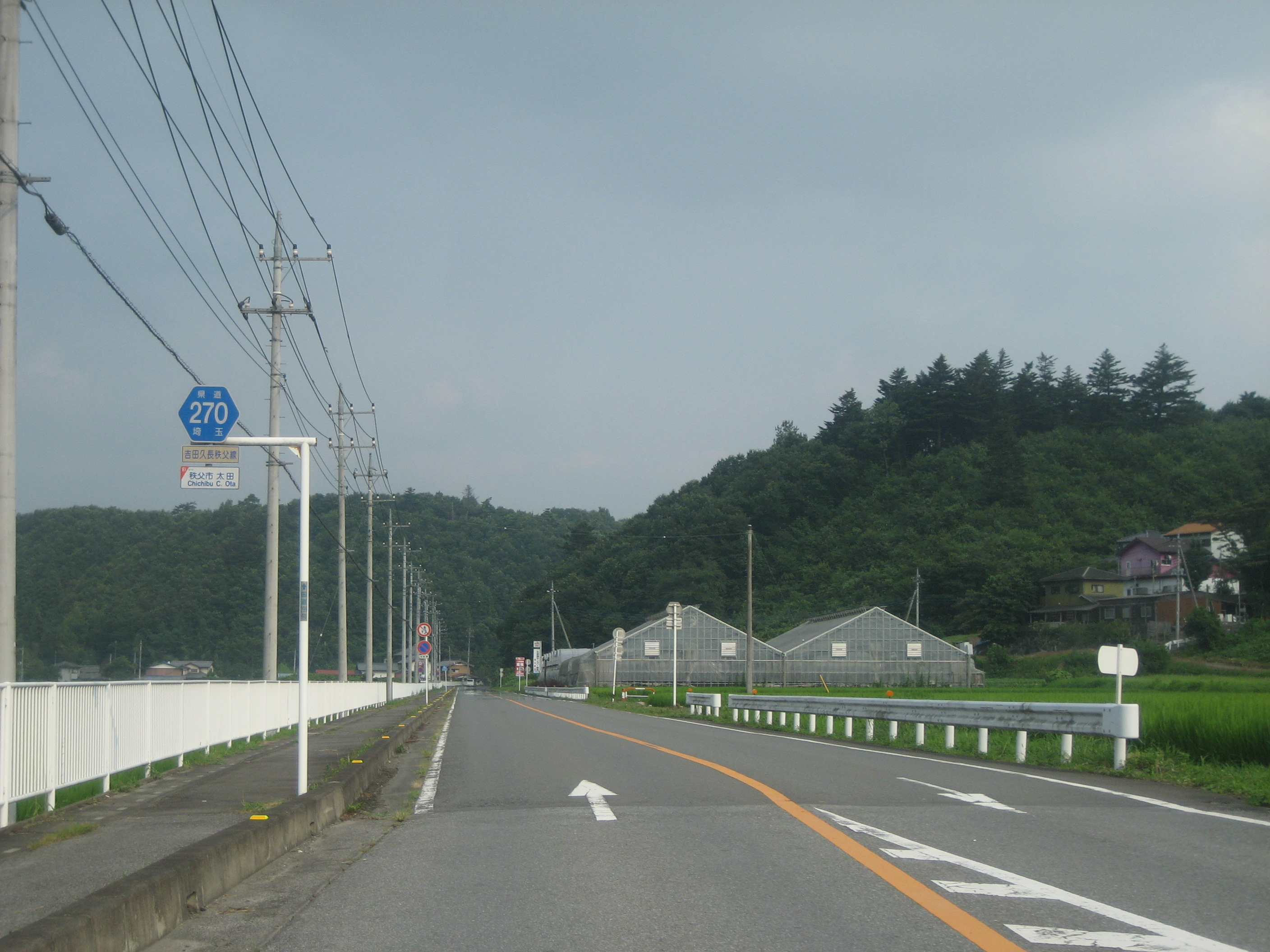 埼玉県道270号線秩父市内２